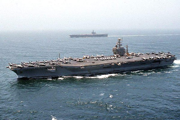 Official US Navy Photograph